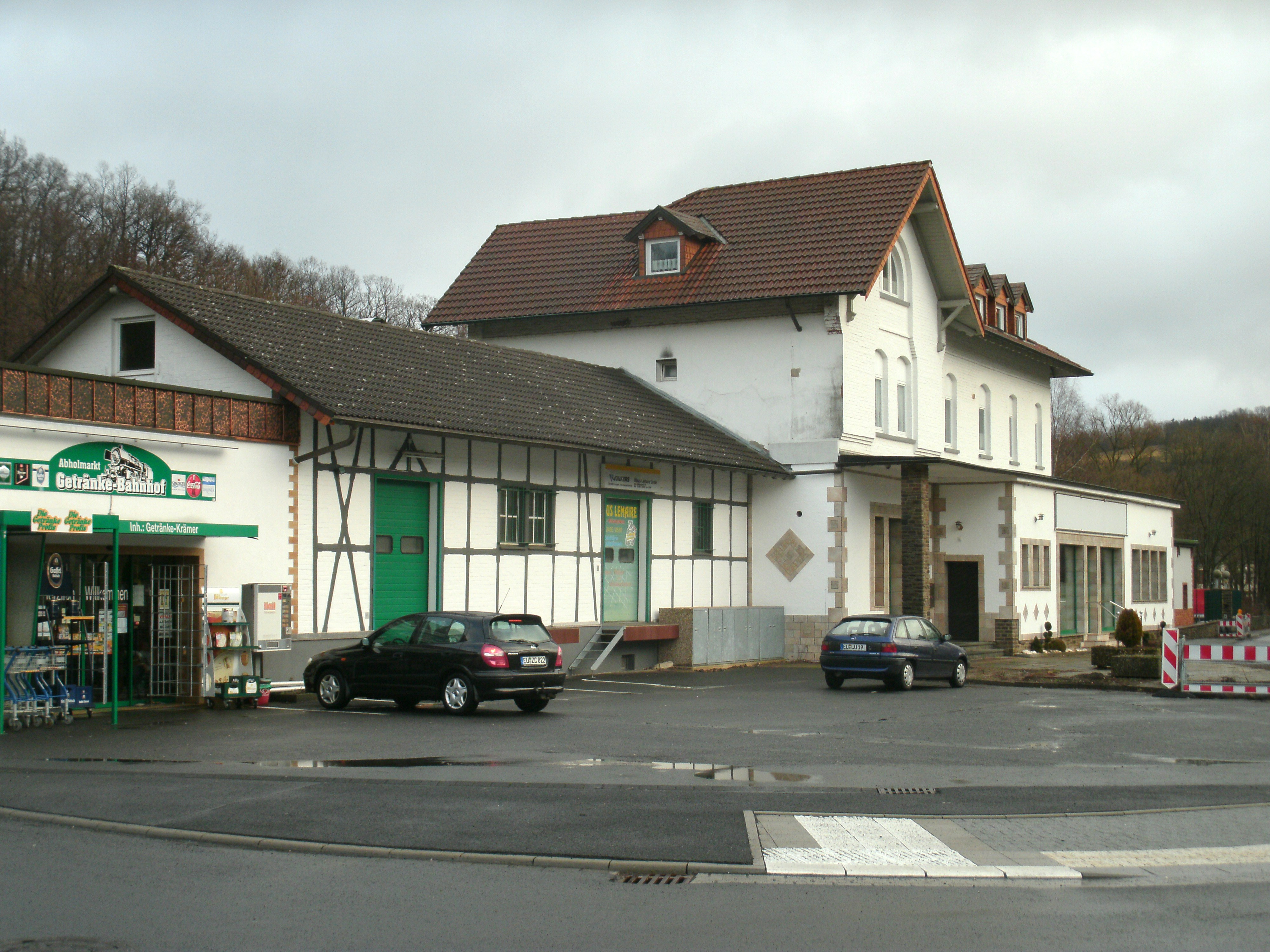 Das Bahnhofsgebäude des Bahnhofs Hellenthal, heute als Getränkehandel genutzt, von der Straßenseite aus